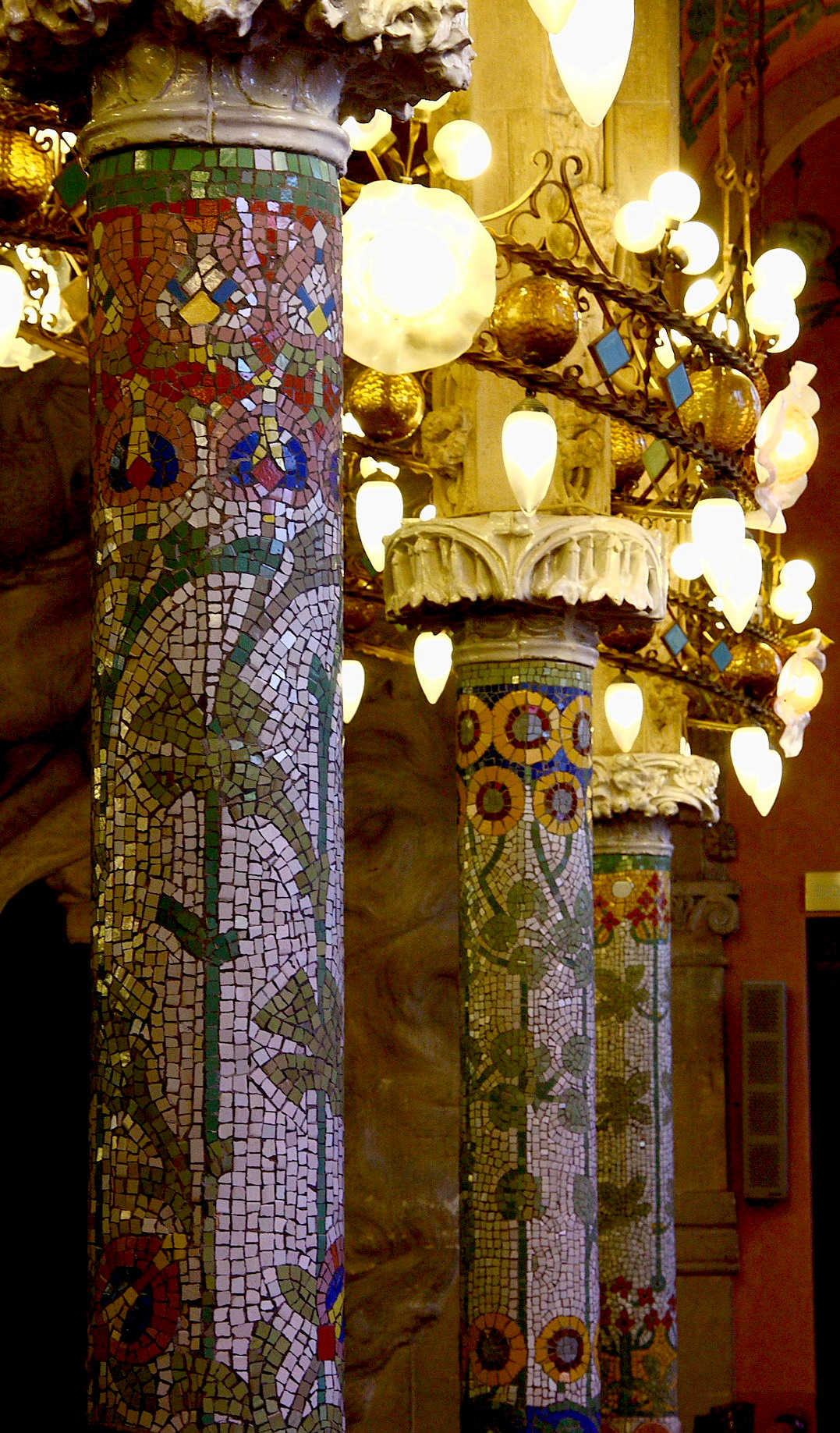 Palau de la Música - Detall de les columnes del segon pis. Mosaic de Lluís Bru